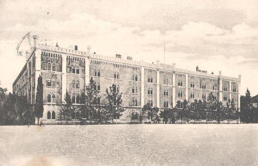 k.u.k. Marinekaserne in Pola